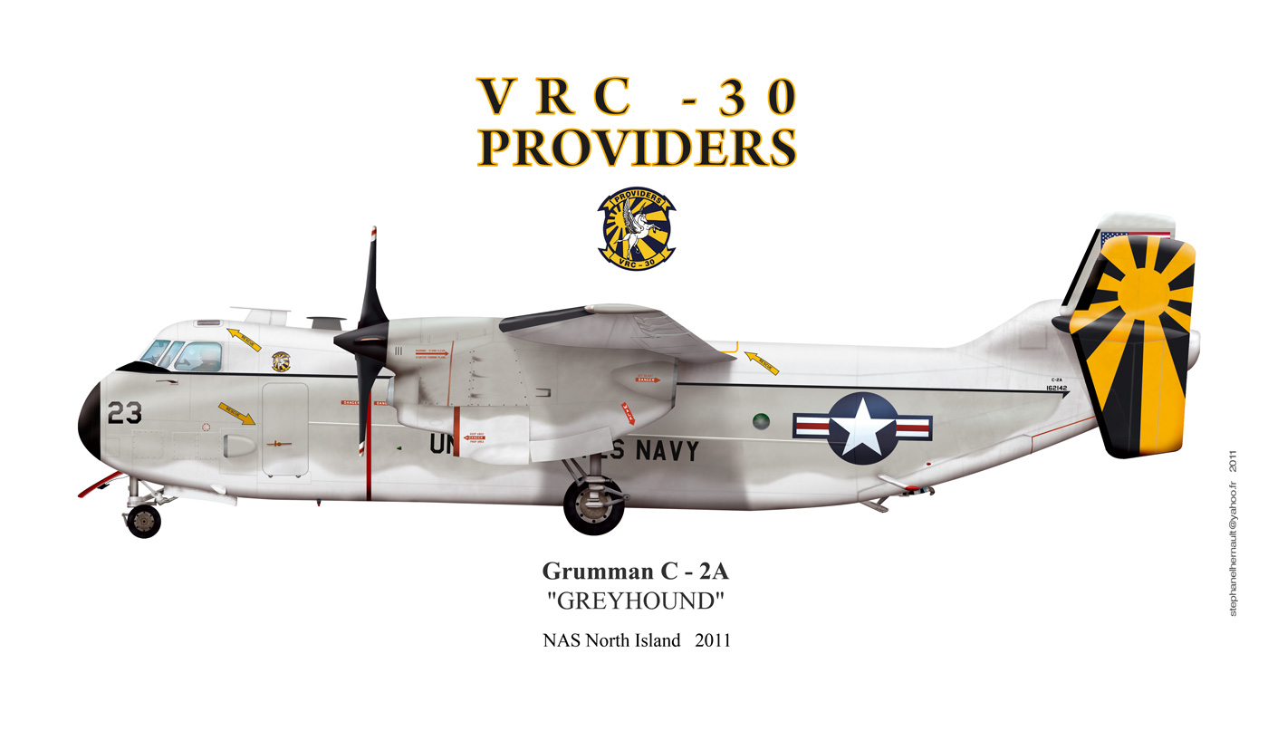 Grumman C2A Greyhound VRC 30 color scheme